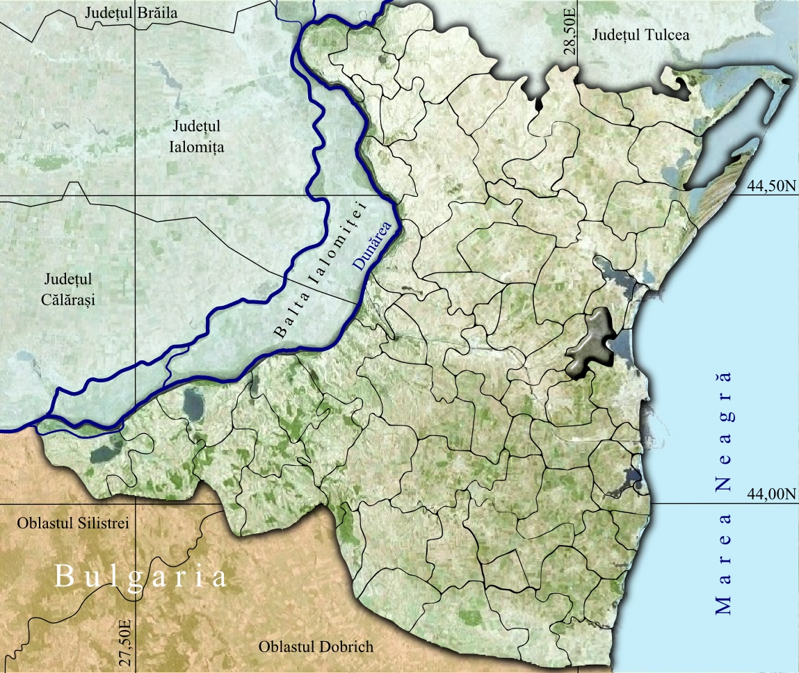 Ovidiu jud Constanta.jpg